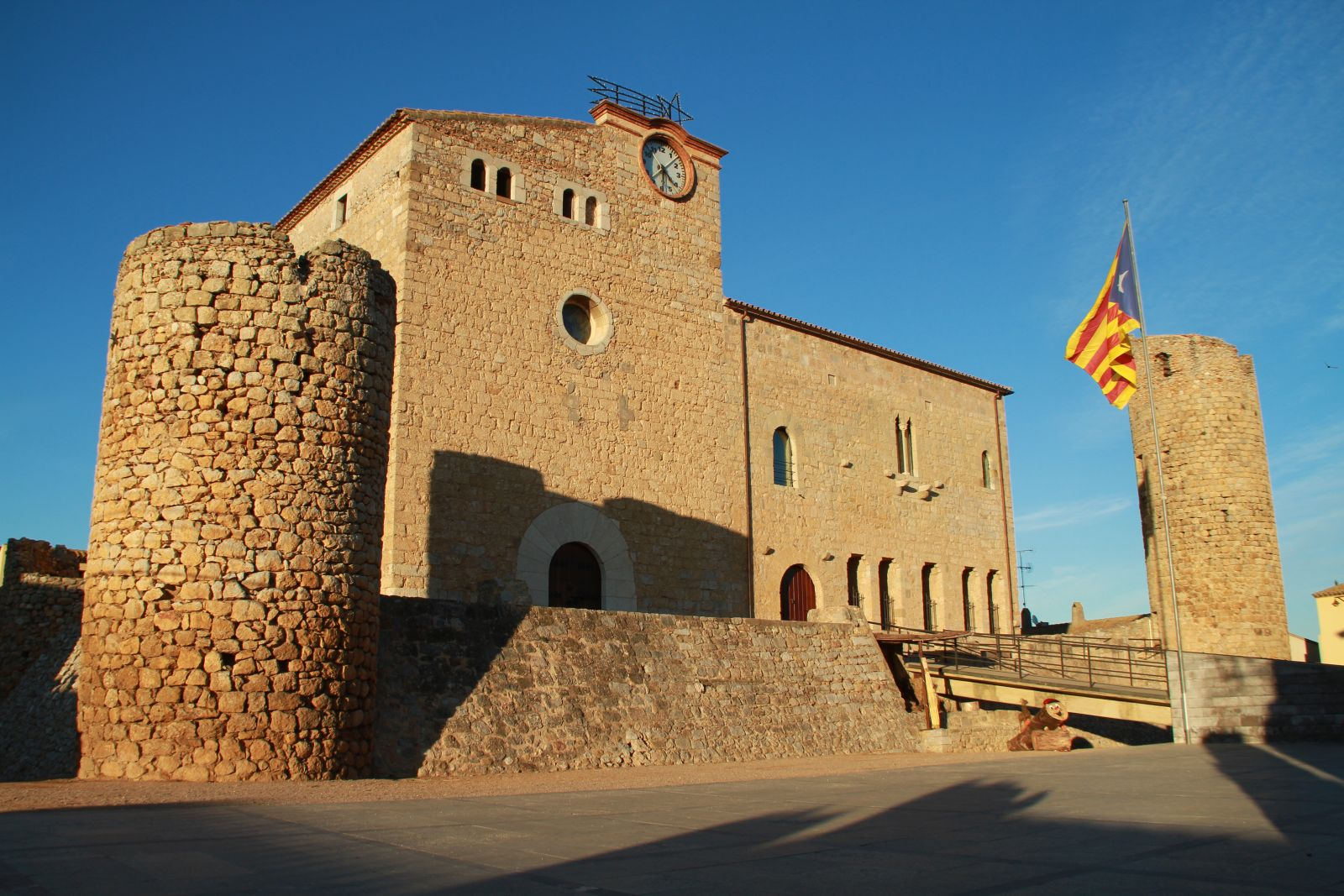 Burg / Schloss von Bellcaire d'Emporda